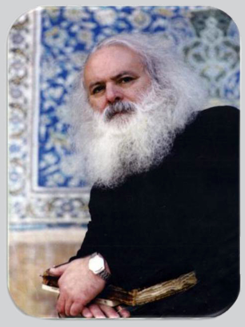 تصویر استاد